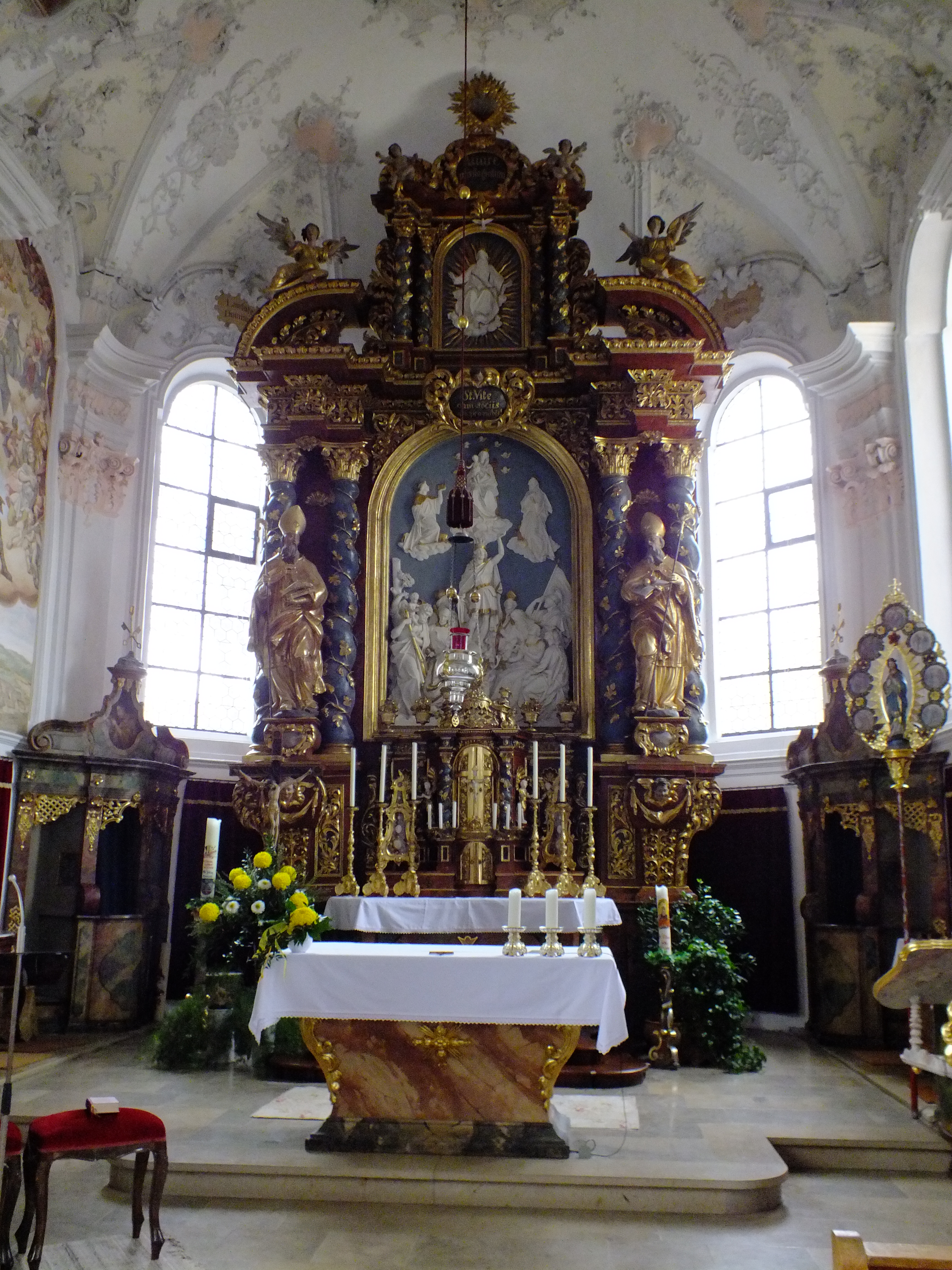 St. Vitus im oberschwäbischen Mauerstetten in Bayerisch/Schwaben